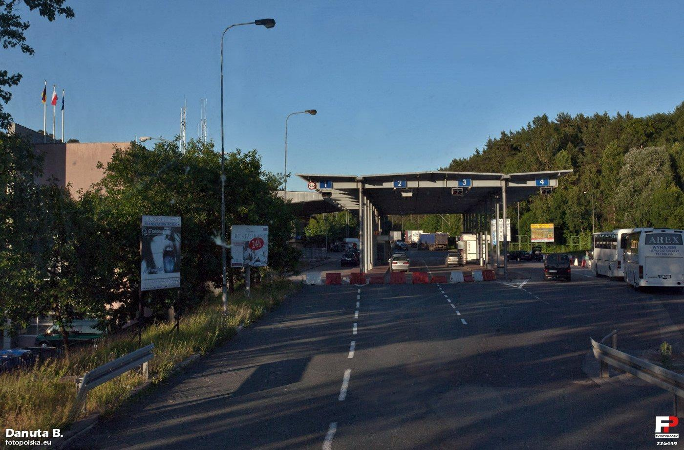 Widok w kierunku zachodnim, czyli infrastruktura przejścia granicznego Świecko-Frankfurt nad Odrą.